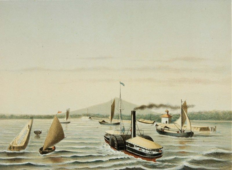 Litho. Litho naar een oorspronkelijke aquarel van J. Rappard.. De Ciliwung tussen de havendammen